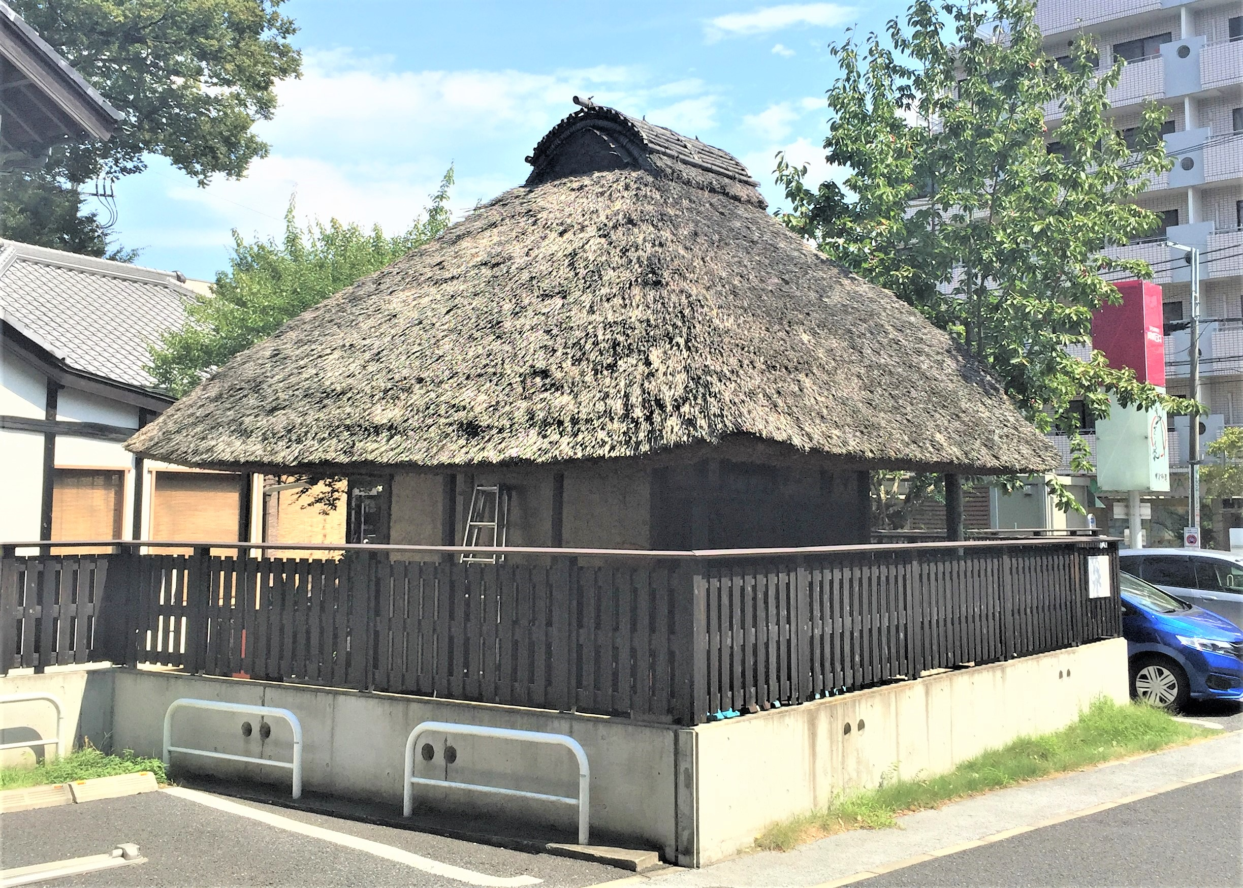 鈴木家住宅穀倉（すずきけじゅうたくこくぐら） 明治時代・世田谷区指定有形文化財 東京都世田谷区等々力2－39 明治時代